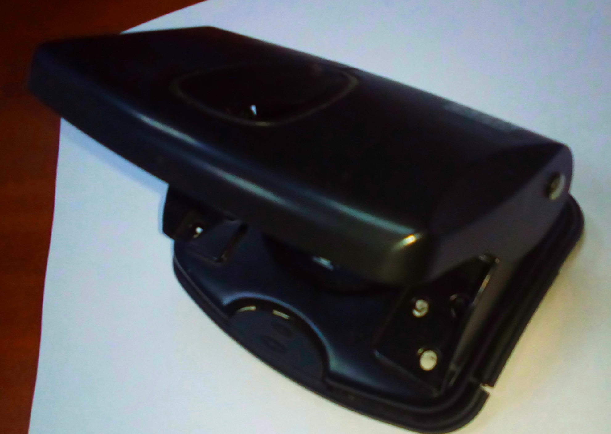 Власна робота. Фото для статті Діркопробивач